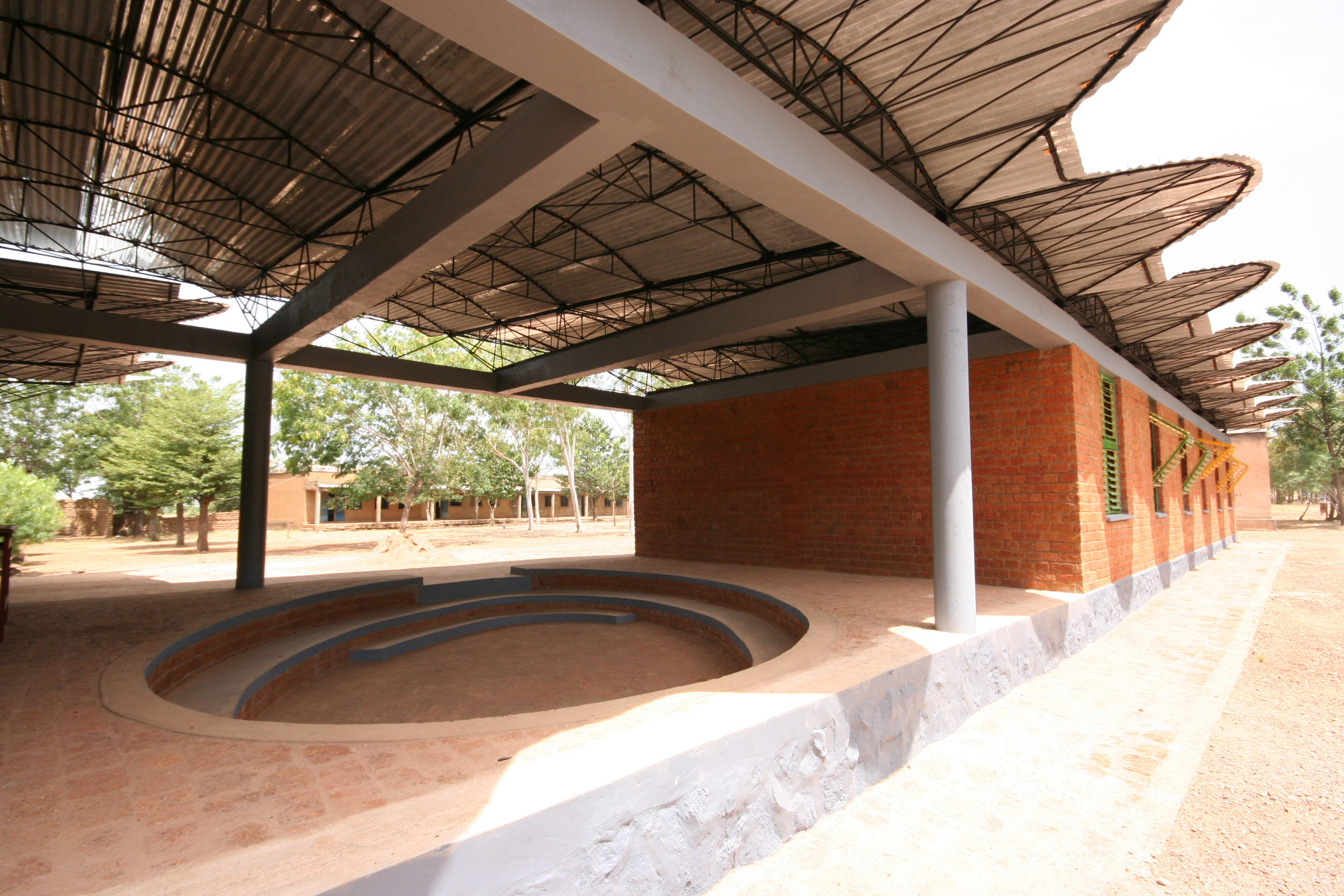 The secondary school in Dano, Burkina Faso, is designed by Francis Kéré.